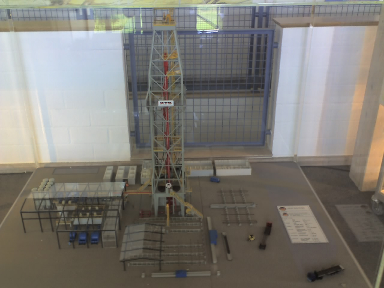 Model des Kontinentalen Tiefbohrprojekt in Windischeschenbach